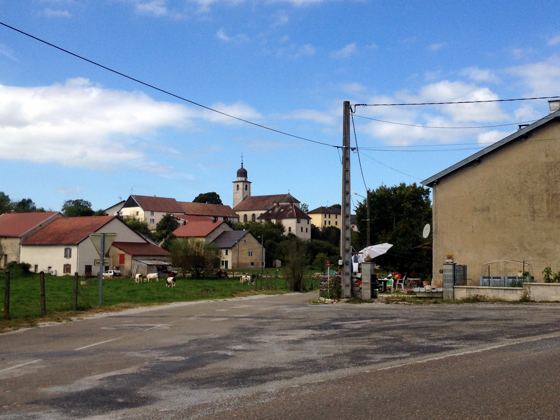 Soucia.